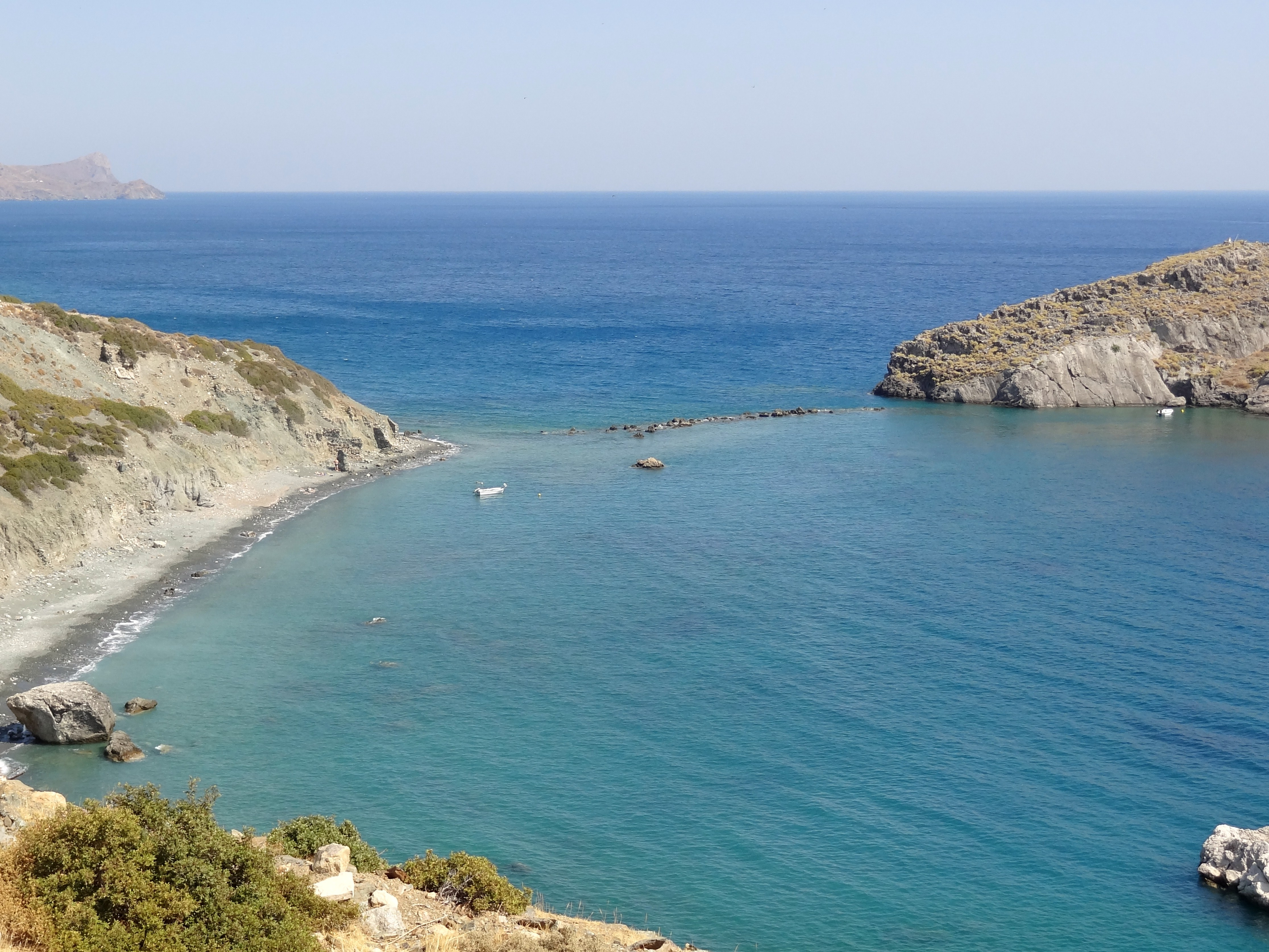 Blick auf die ehemalige Hafenmole von Lasaia (Λασαία) zur Insel Trafos (Τράφος), Gemeinde Festos, Regionalbezirk Iraklio, Kreta, Griechenland